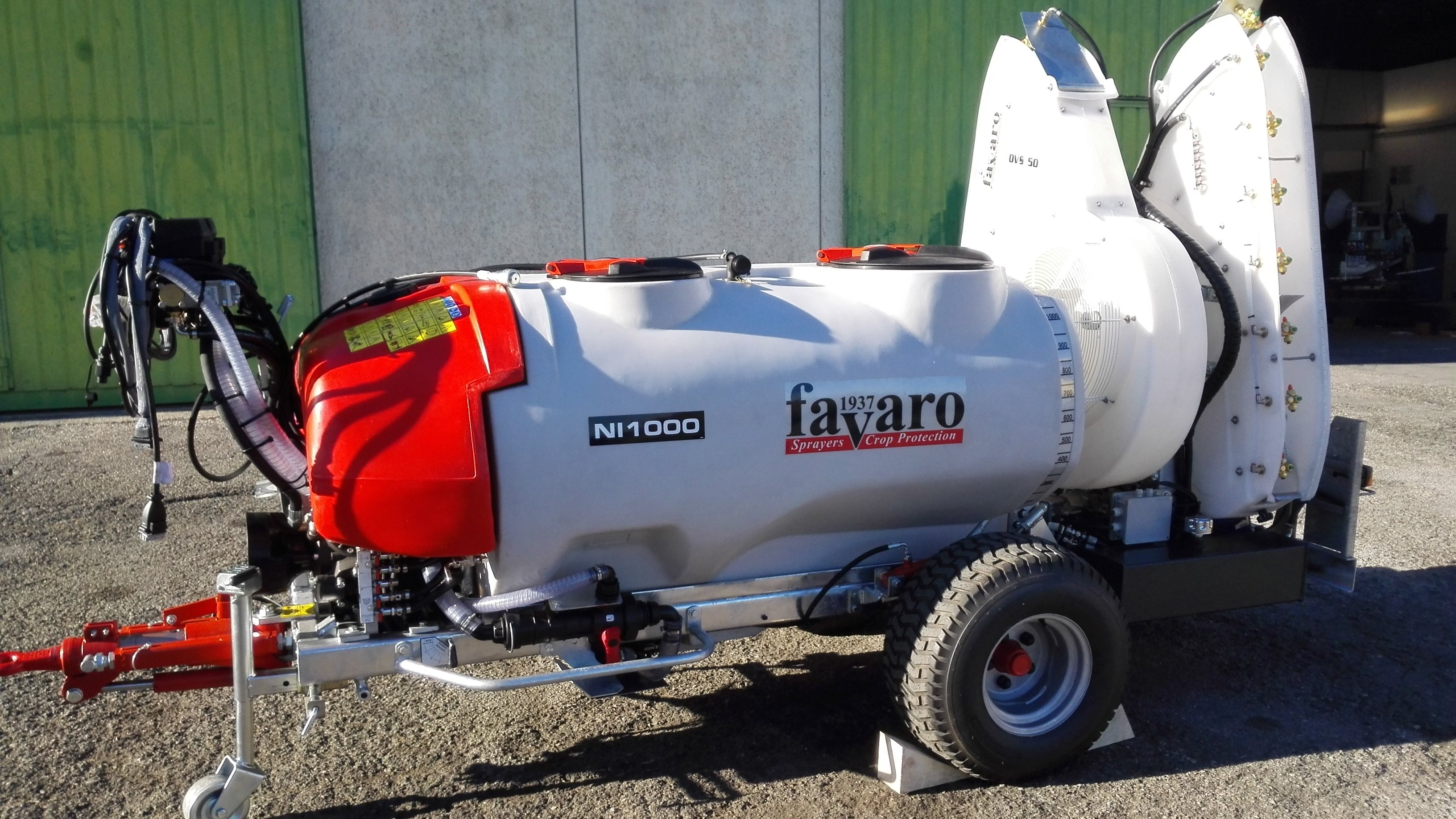 Atomizzatore tangenziale a doppia turbina trainato. Omologato per uso stradale in Italia.